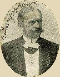 Paul von Baerenfels-Warnow ("von Bärenfels-Warnow") (geb. 19. Mai 1848 Rustow/Pommern; gest. 2. Nov. 1910 in Neustrelitz), Theaterintendant, Kammerherr